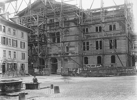 Nordfassade des Schweizer Parlamentsgebäudes während der Bauphase (das Haus links und der Brunnen wurden später abgerissen).